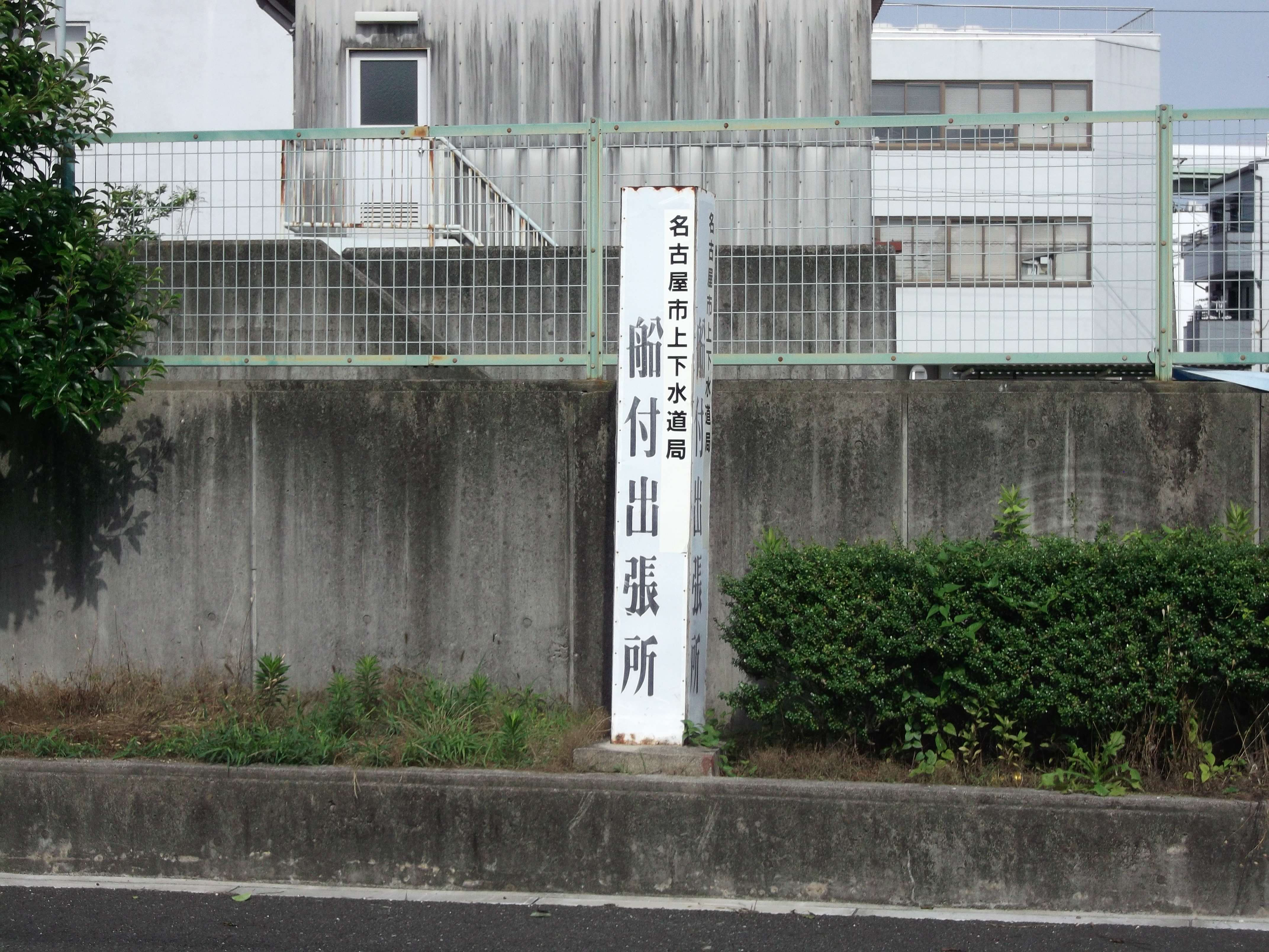 名古屋市北区大杉一丁目の名古屋市上下水道局船附出張所看板を東側公道より撮影